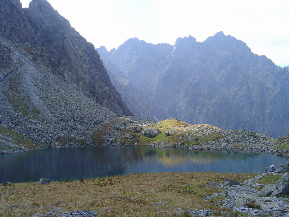 Ganok over Litvorove pleso